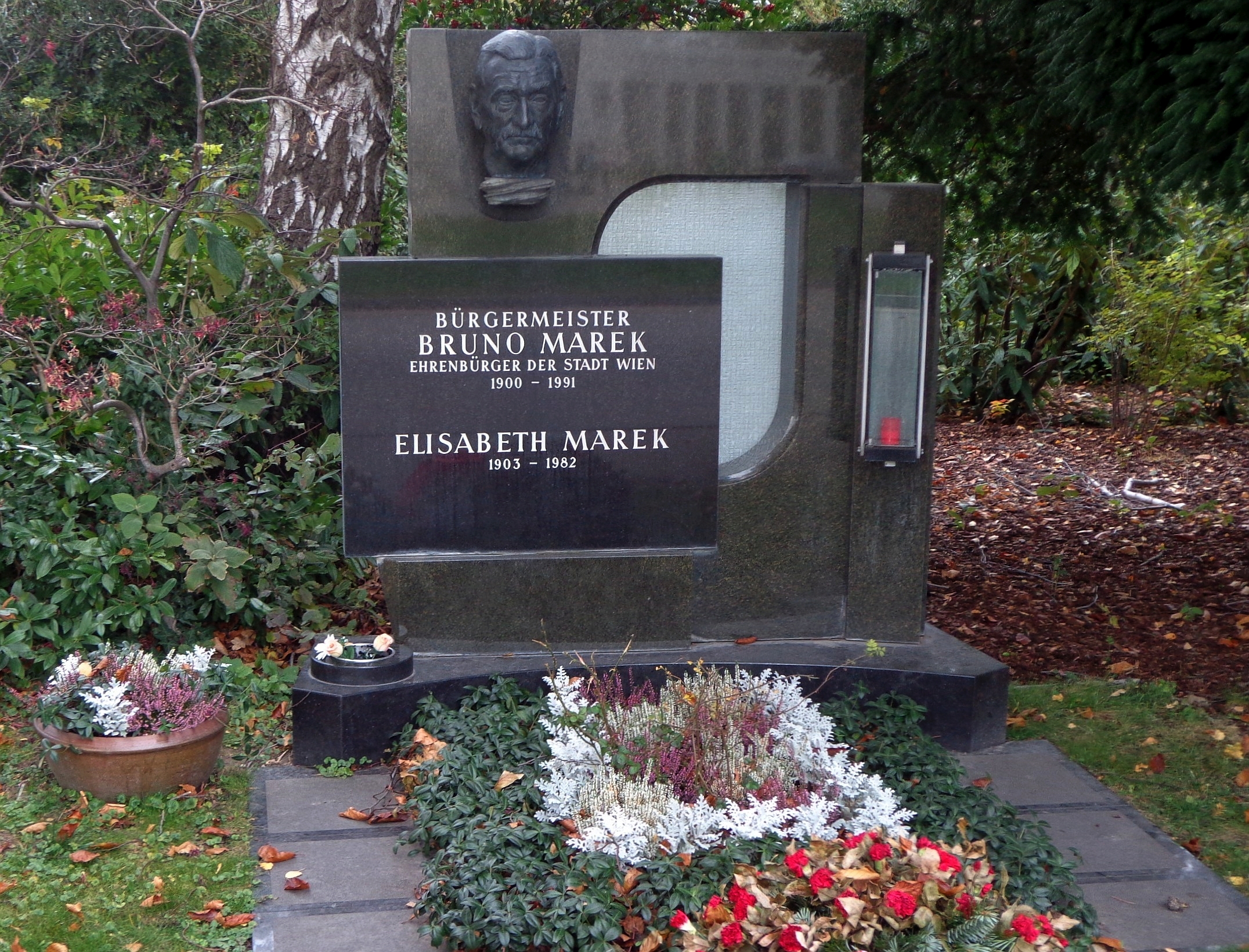 Wiener Zentralfriedhof - Gruppe 14 C, Ehrengrab von Bruno Marek